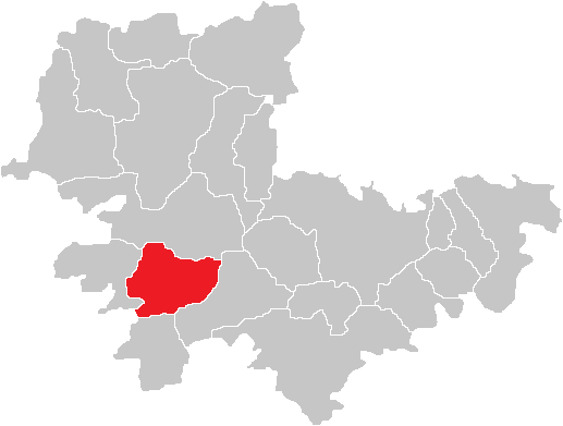 Bezirk Tulln